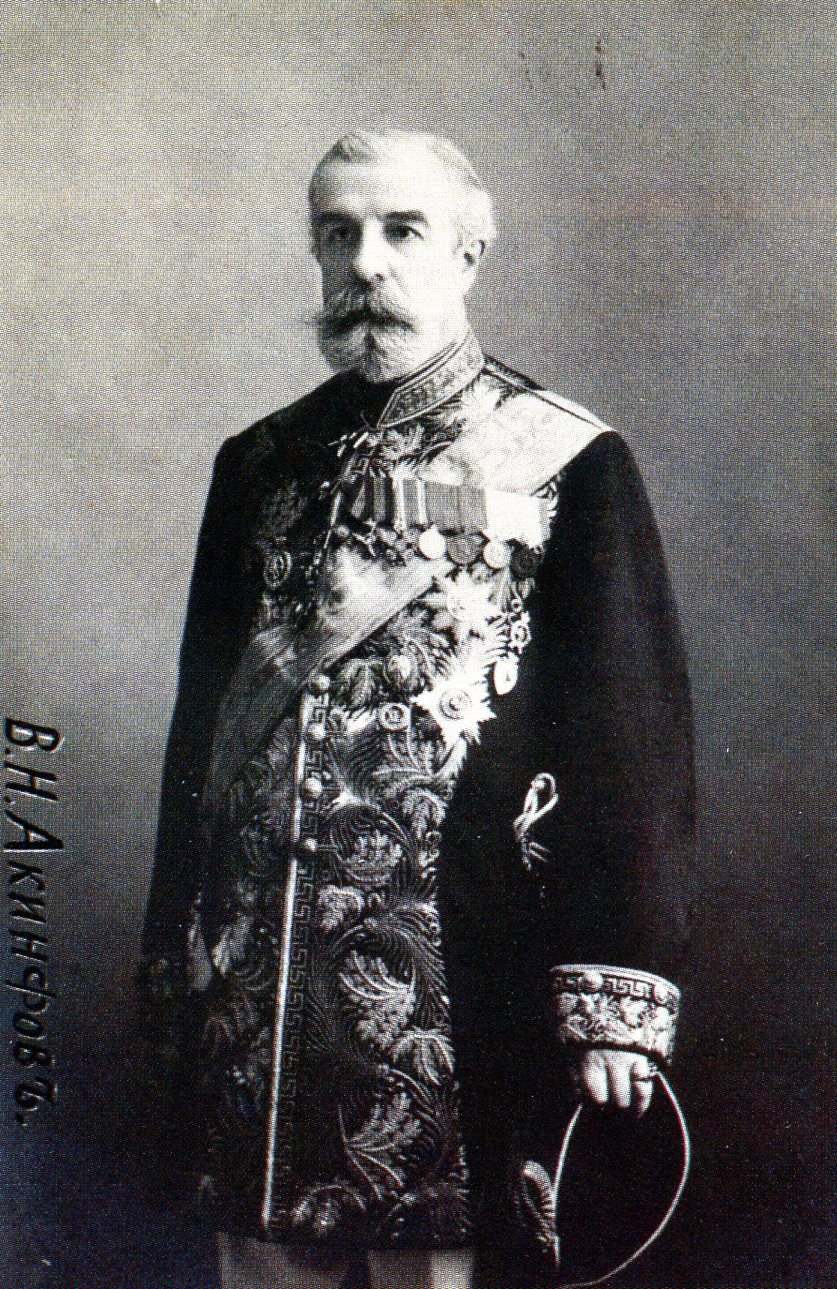 Портрет Владимира Николаевича Акинфова (1841-1914)